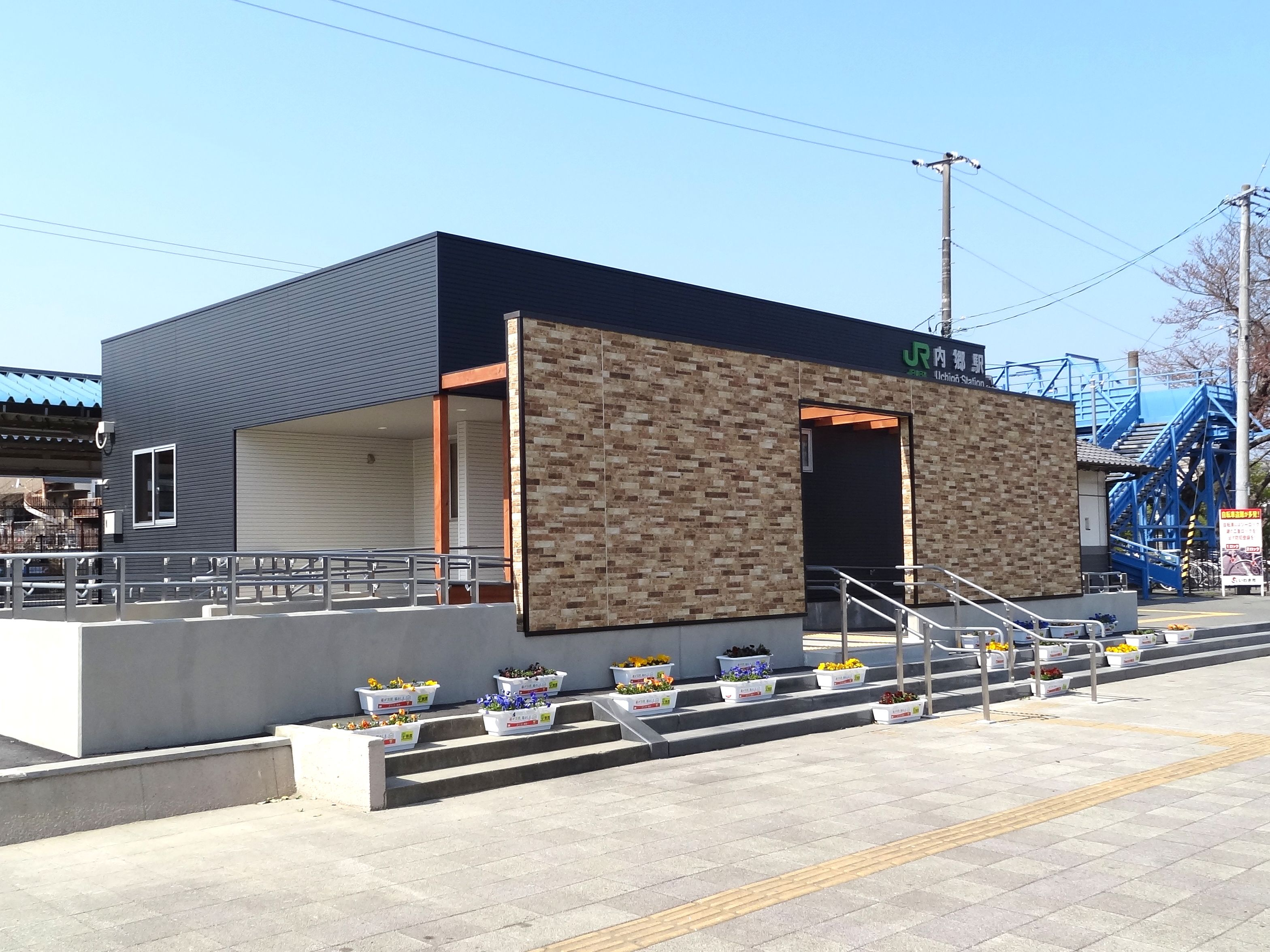 JR東日本常磐線 内郷駅